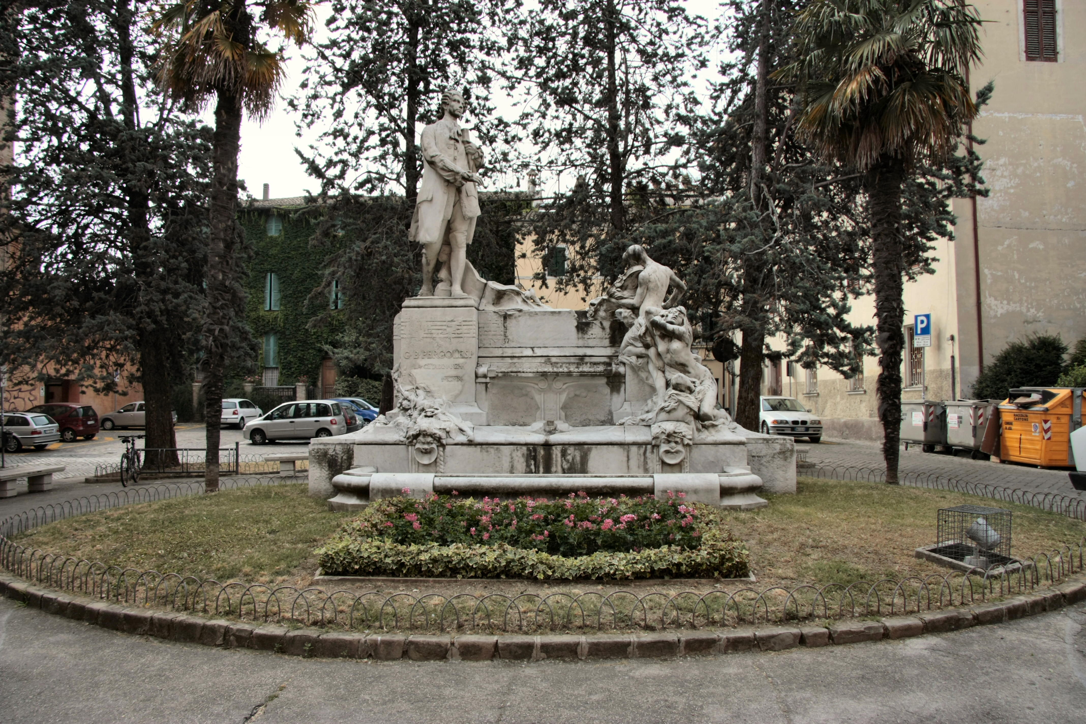 Pergolesi Denkmal in Jesi (Marken)